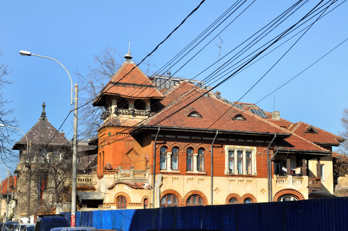 Casă monument istoric creata in stilul neoromanesc de catre arh. Socolescu, propr. Nicolae Dianu, fondator Fundaţia Probasarabia şi Bucovina.